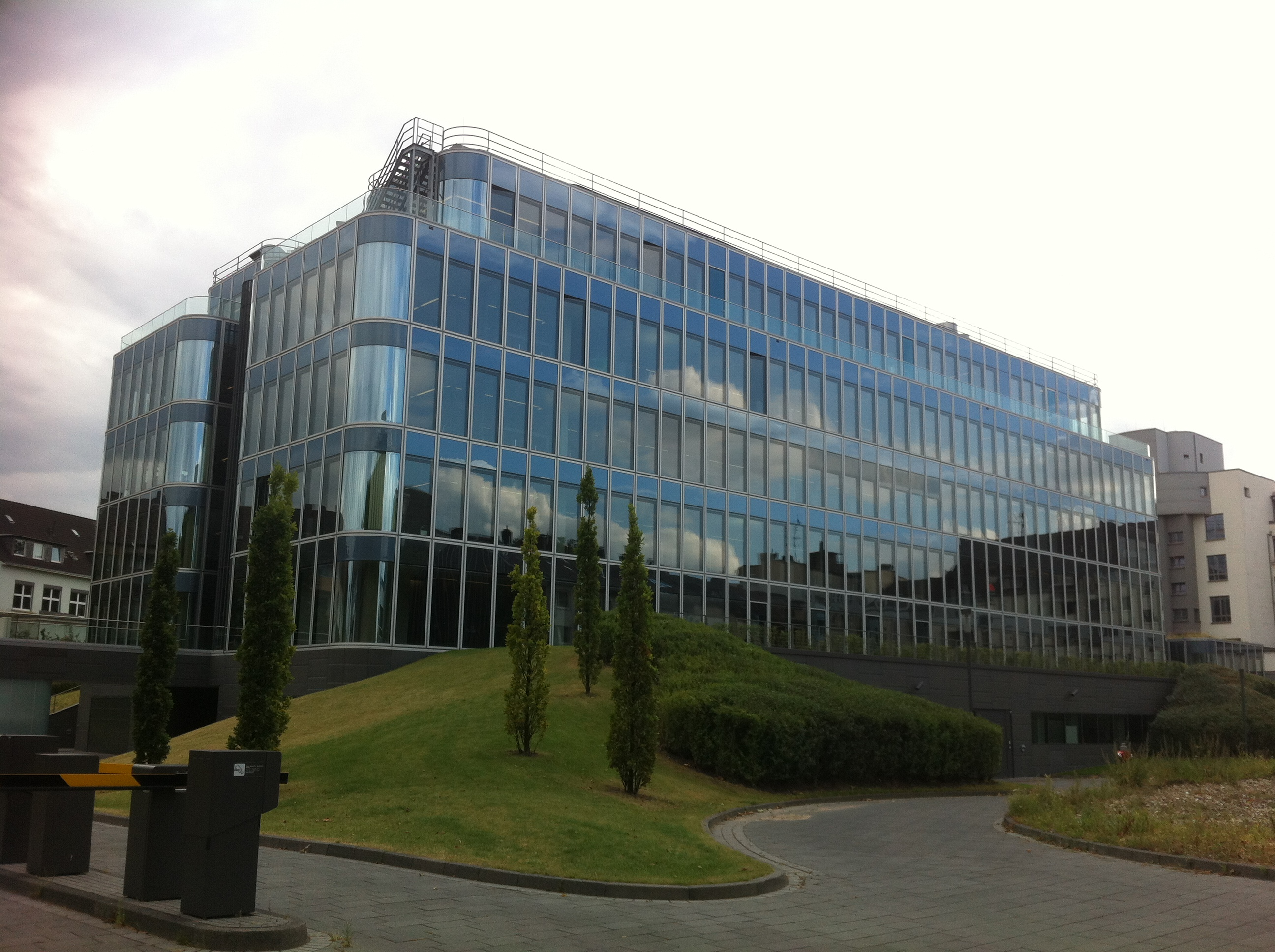 Stadtwerke Essen